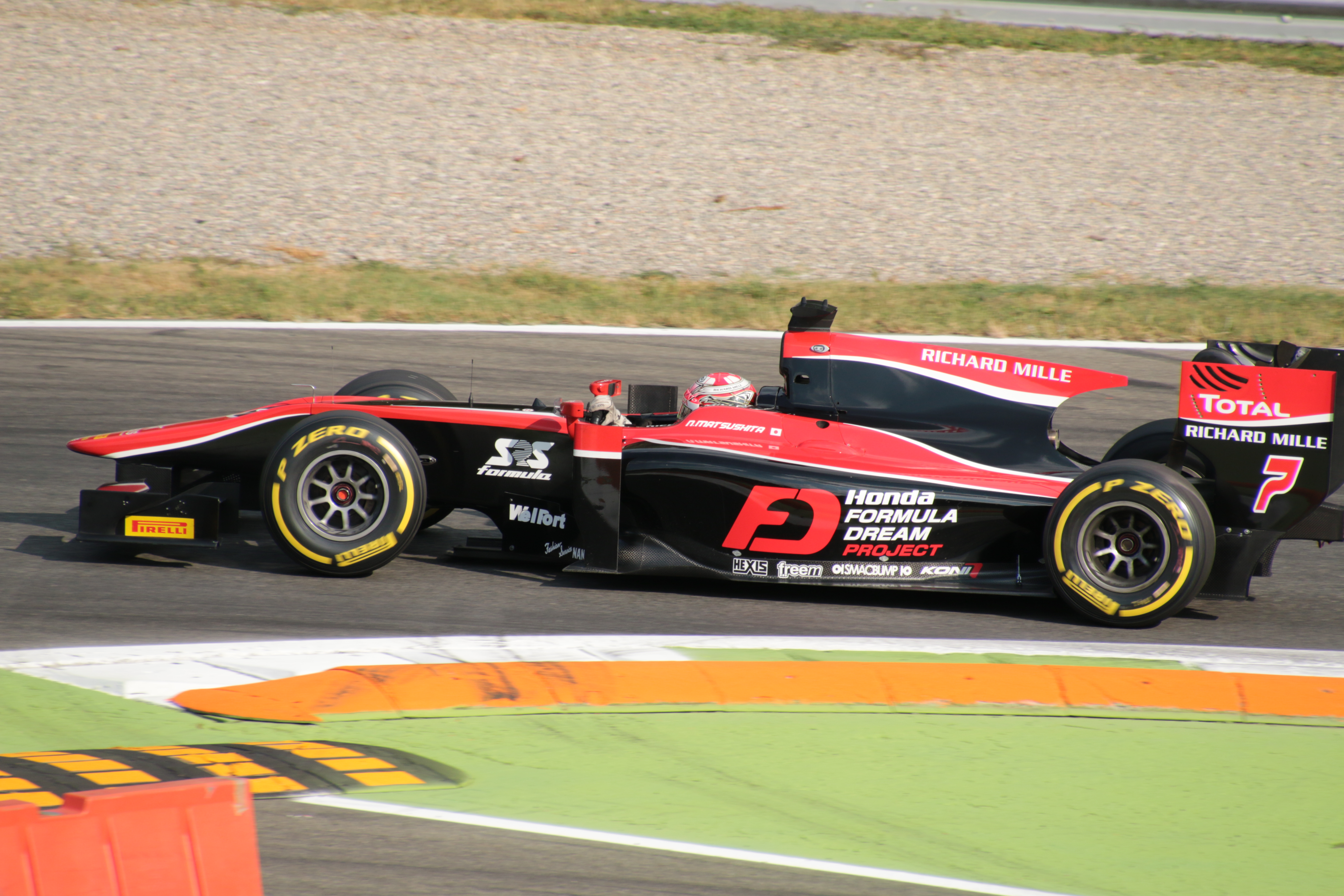 F2予選：松下君